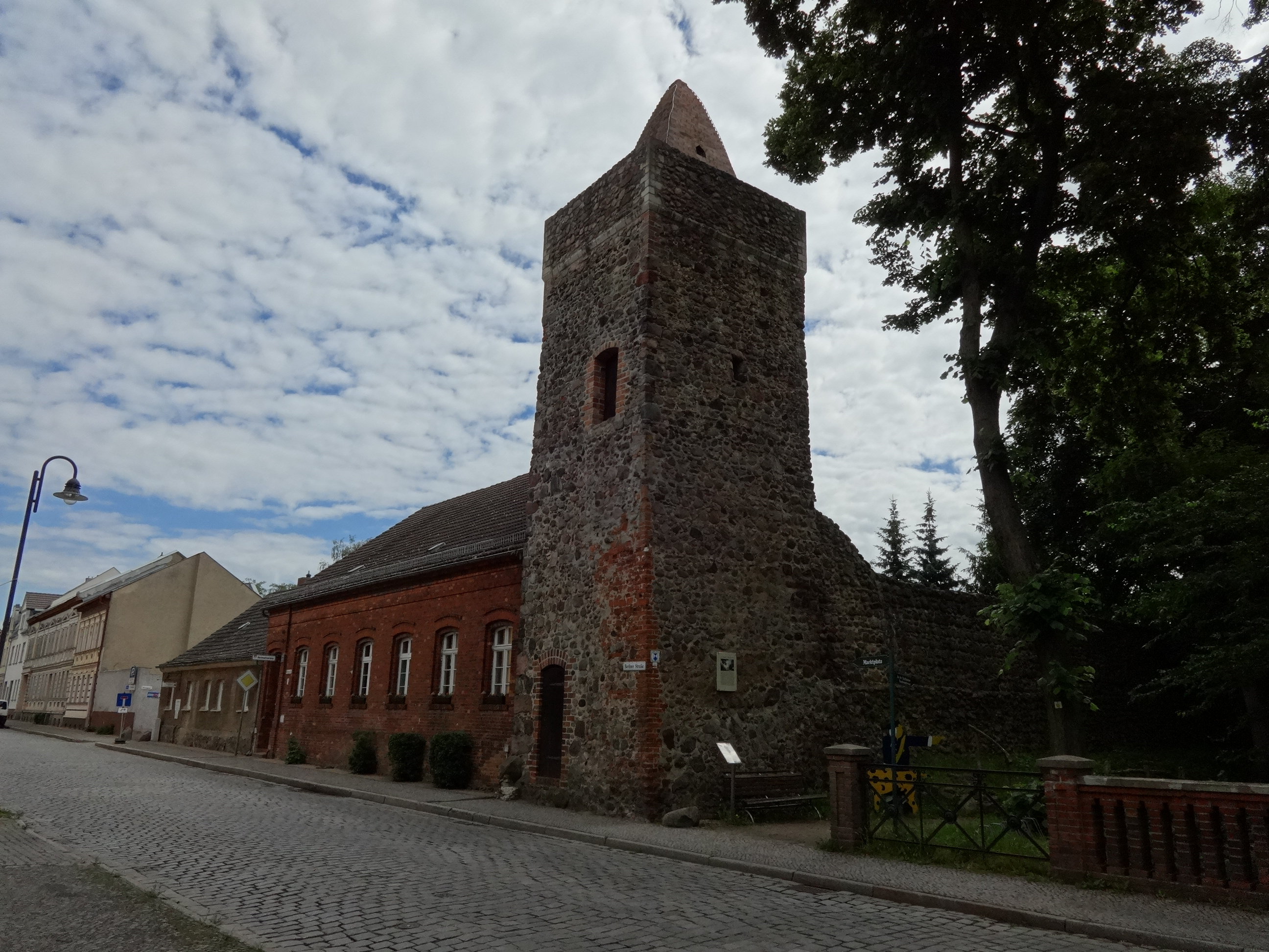 Berliner Torturm, Teil der mittelalterlichen Stadtbefestigung von Altlandsberg, eine Stadt im Landkreis Märkisch-Oderland, Brandenburg